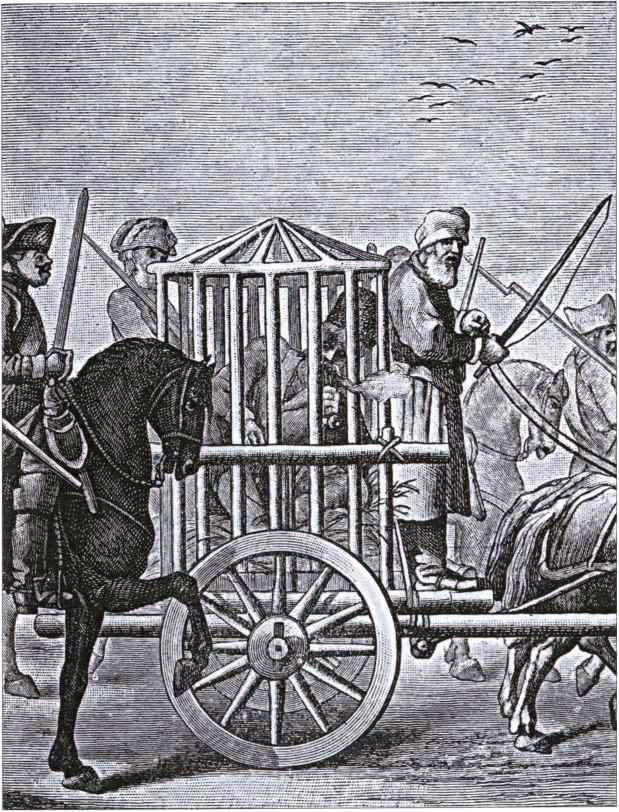 Пугачёв под конвоемгравюра